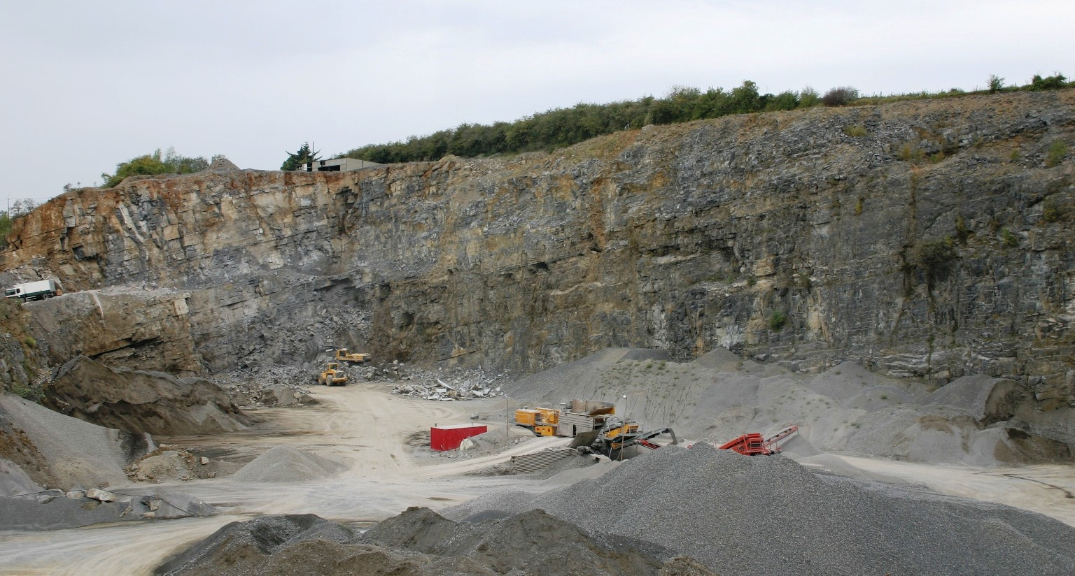 Steekaul zu Sprimont.